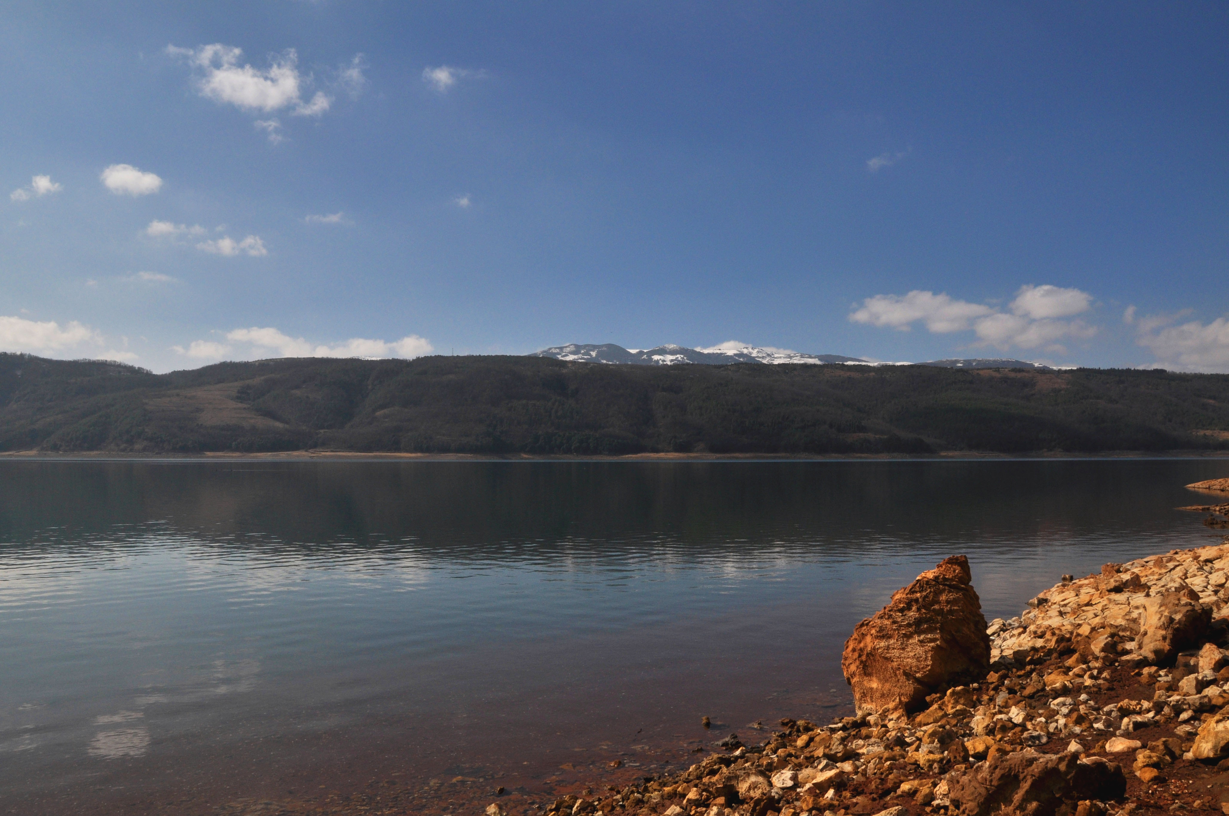 云南省寻甸县境内的清水海。